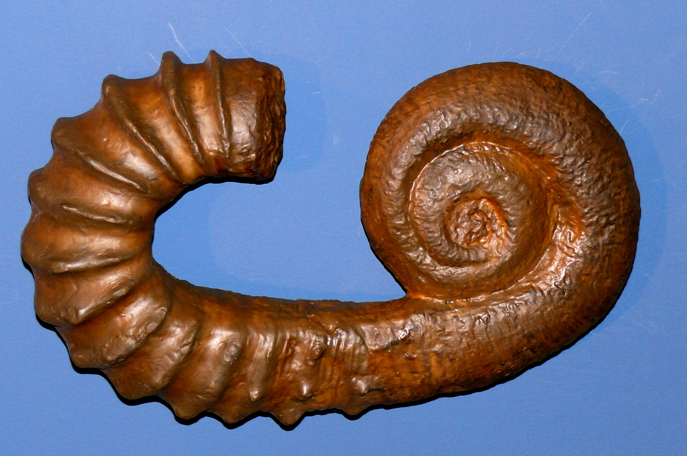 Heteroceratidae indet., Jura, Lias, Balingen